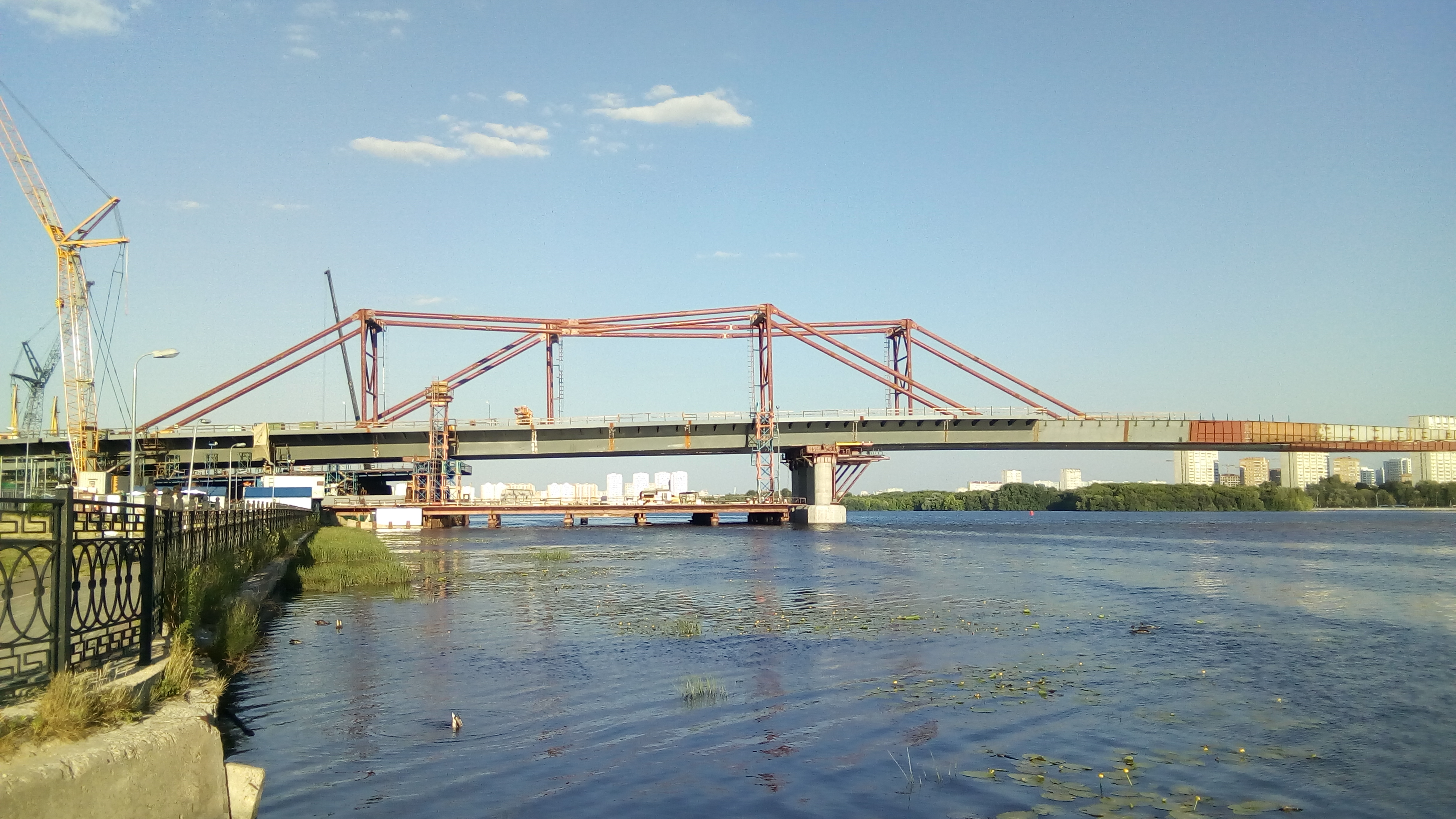 Строительство нового автомобильного моста через Кожуховский затон от 2-го Южнопортового проезда в район Нагатинской поймы и к тематическому парку «Остров мечты» в июне 2019 года. Снято со стороны 2-го Южнопортового проезда